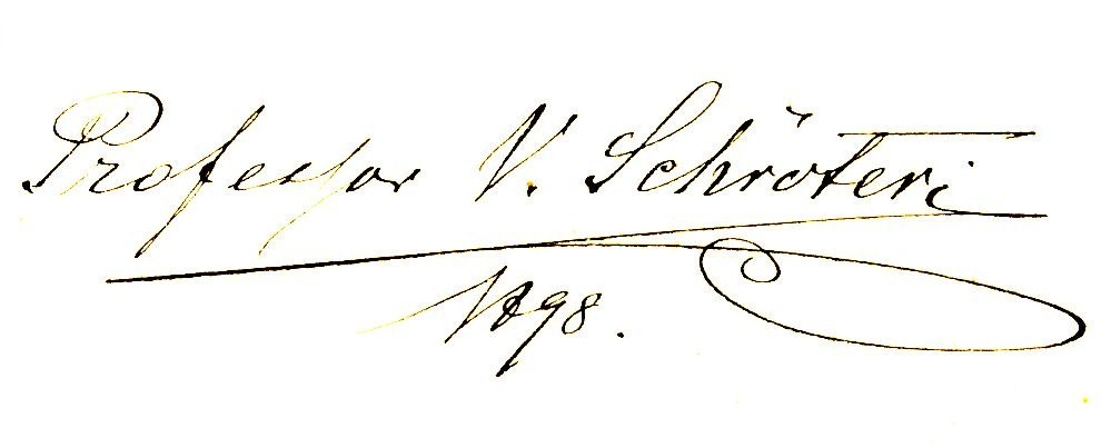 Original-Unterschrift des Hofarchitekten Viktor Schröter (1839-1901) unter seinen Entwürfen für die russisch-orthodoxe Kirche in Bad Kissingen